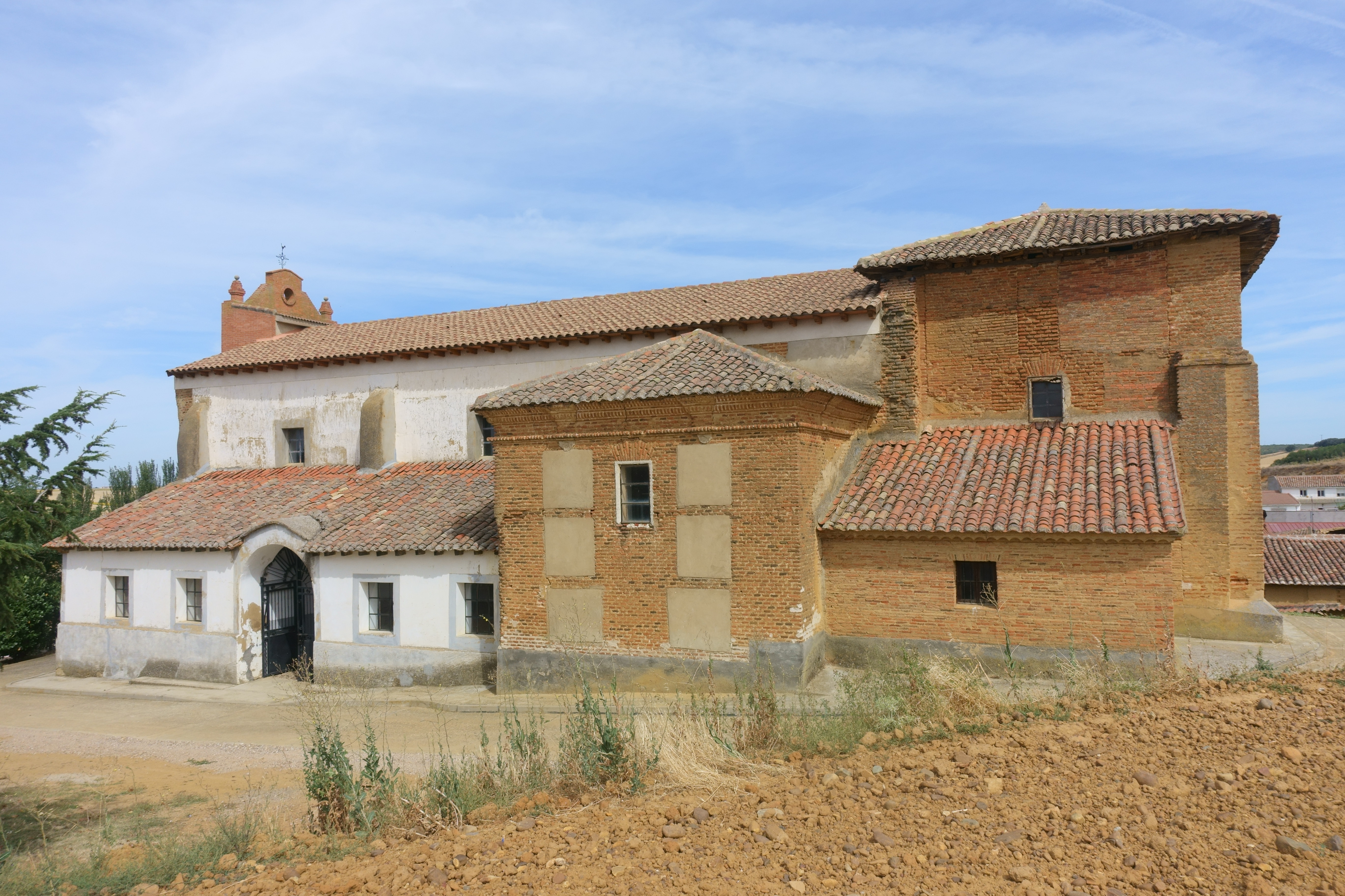 Vista lateral de la iglesia de Santiago Apóstol, en Ledigos (Palencia, España).